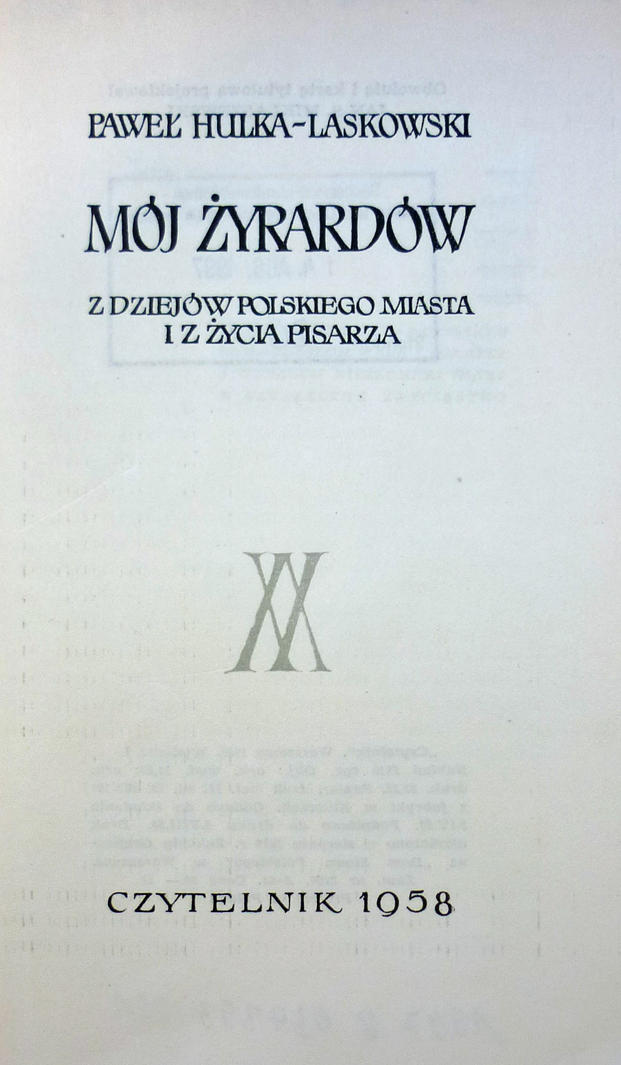 Titelblatt des Buchs "Mój Żyrardów" von Paweł Hulka-Laskowski, wyd. II „Czytelnik” 1958. Titel: Mój Żyrardów – z dziejów polskiego miasta i z życia pisarza (Mein Żyrardów - aus der Geschichte der polnischen Stadt und aus dem Leben des Schriftstellers).